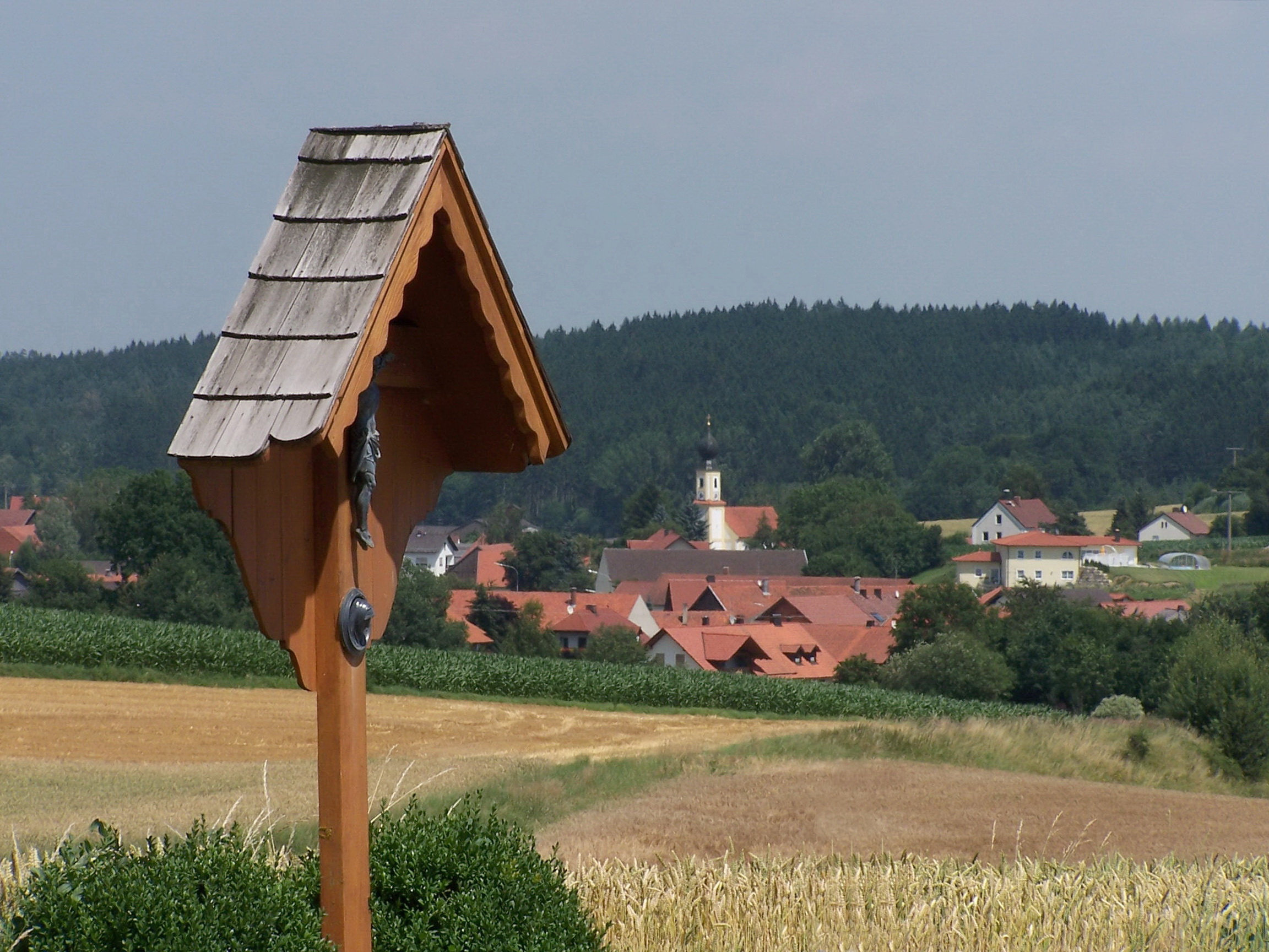 Ergoldsbach, Langenhettenbach, Haus Nr. 204. Filialkirche St. Petrus. Saalkirche mit Westturm, Friesband und Lisenengliederung, Westturm mit Achteckaufsatz und Zwiebelkuppel, 1764; mit Ausstattung. Blick auf Ort und Kirche von Westen aus Richtung Prinkofen.